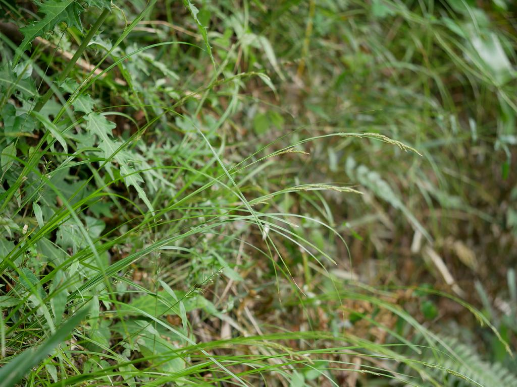 2019/09/29 和歌山県田辺市：Tanabe City. Wakayama Pref. Japan